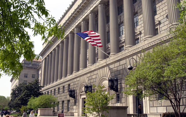 Budova Ministerstva obchodu USA